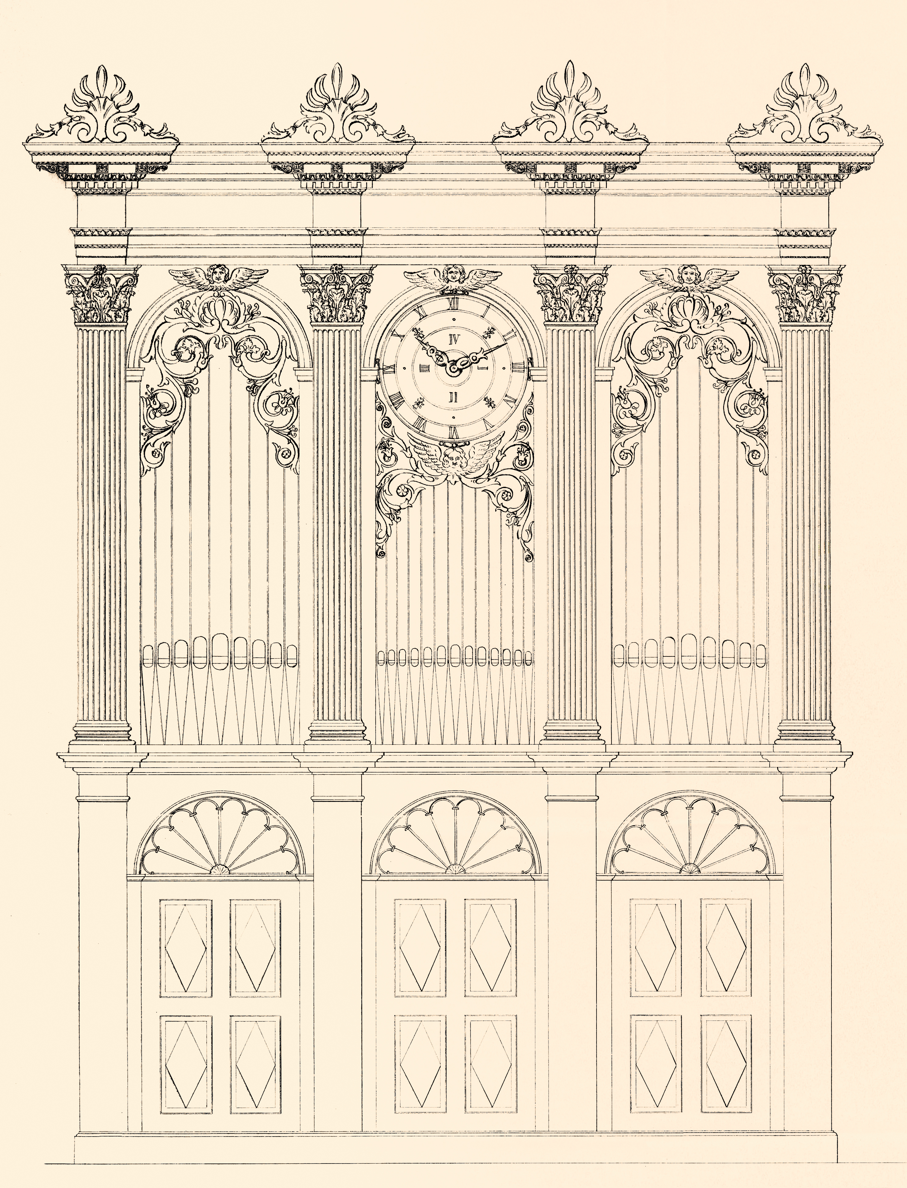 Entwurf für Großgmain 1844, gezeichnet: Louis Mooser